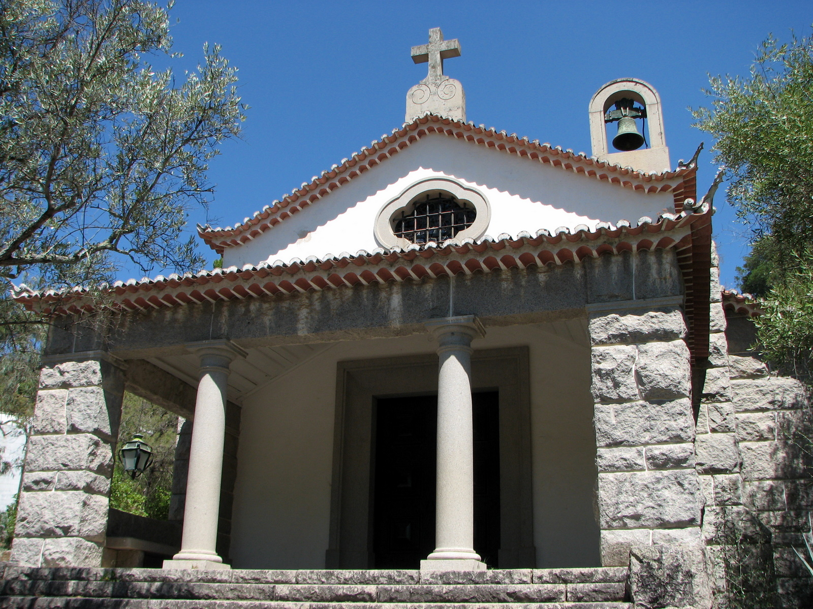 Caldas de Monchique - The Algarve, Portugal